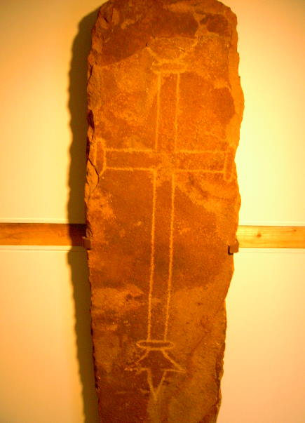 Grabstein aus der Ostsiedlung der Wikinger auf Grönland (Grönländisches Nationalmuseum Nuuk)